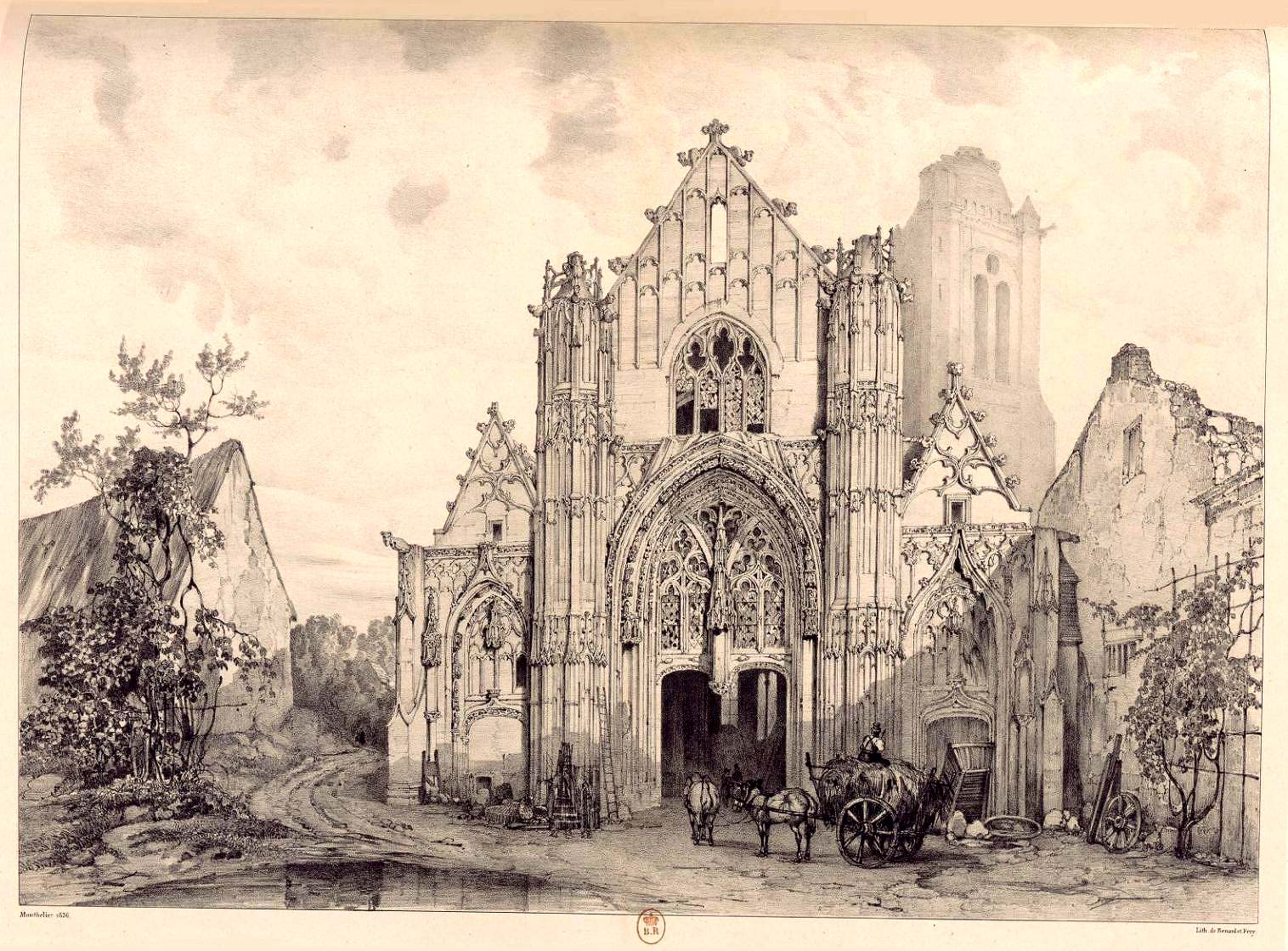 Senlis (Oise), ancienne église Saint-Pierre, façade occidentale, par Alexandre-Jules Monthelier, 1836.